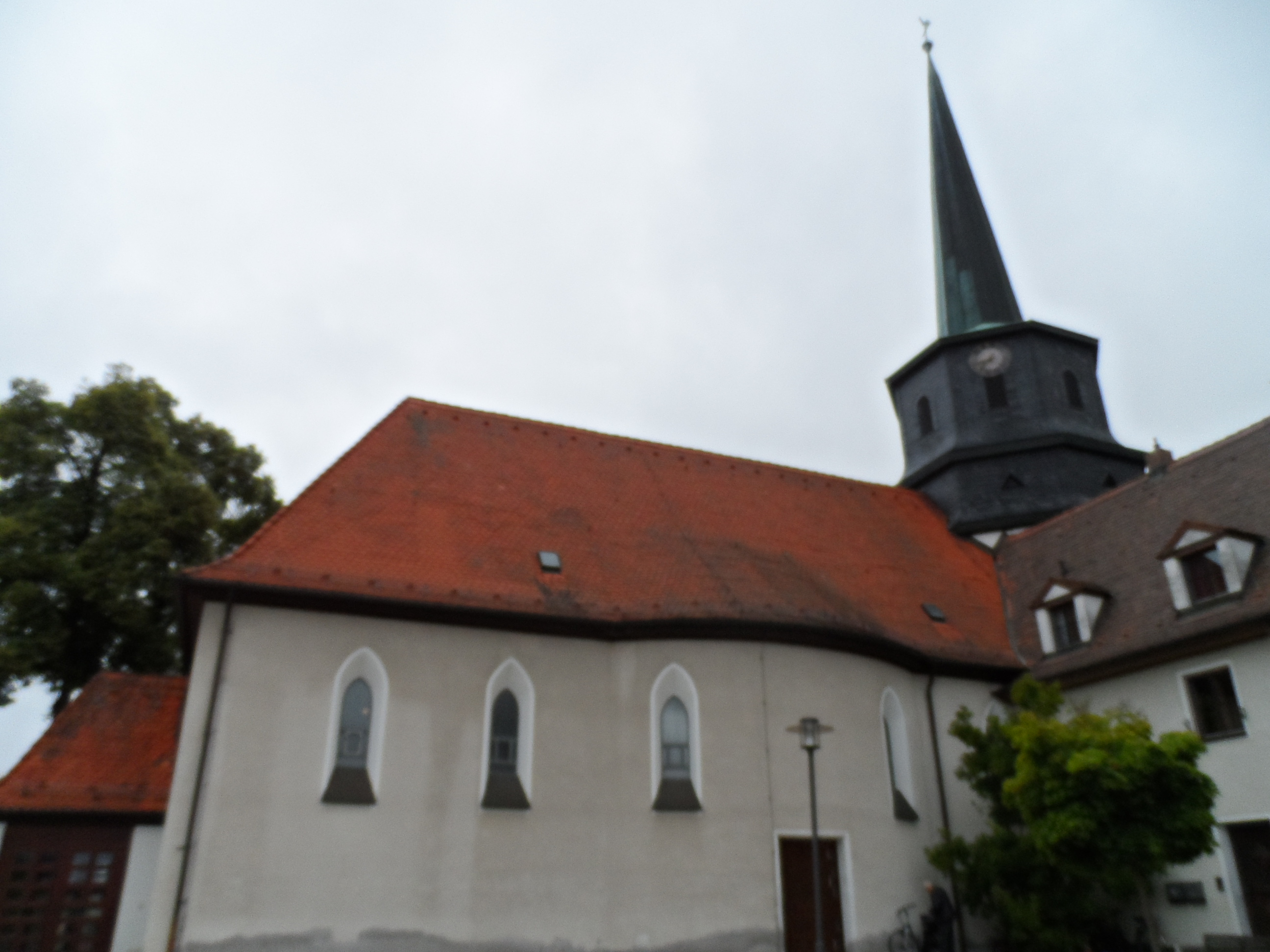 Pfarrkirche St. Josef in Niederndorf